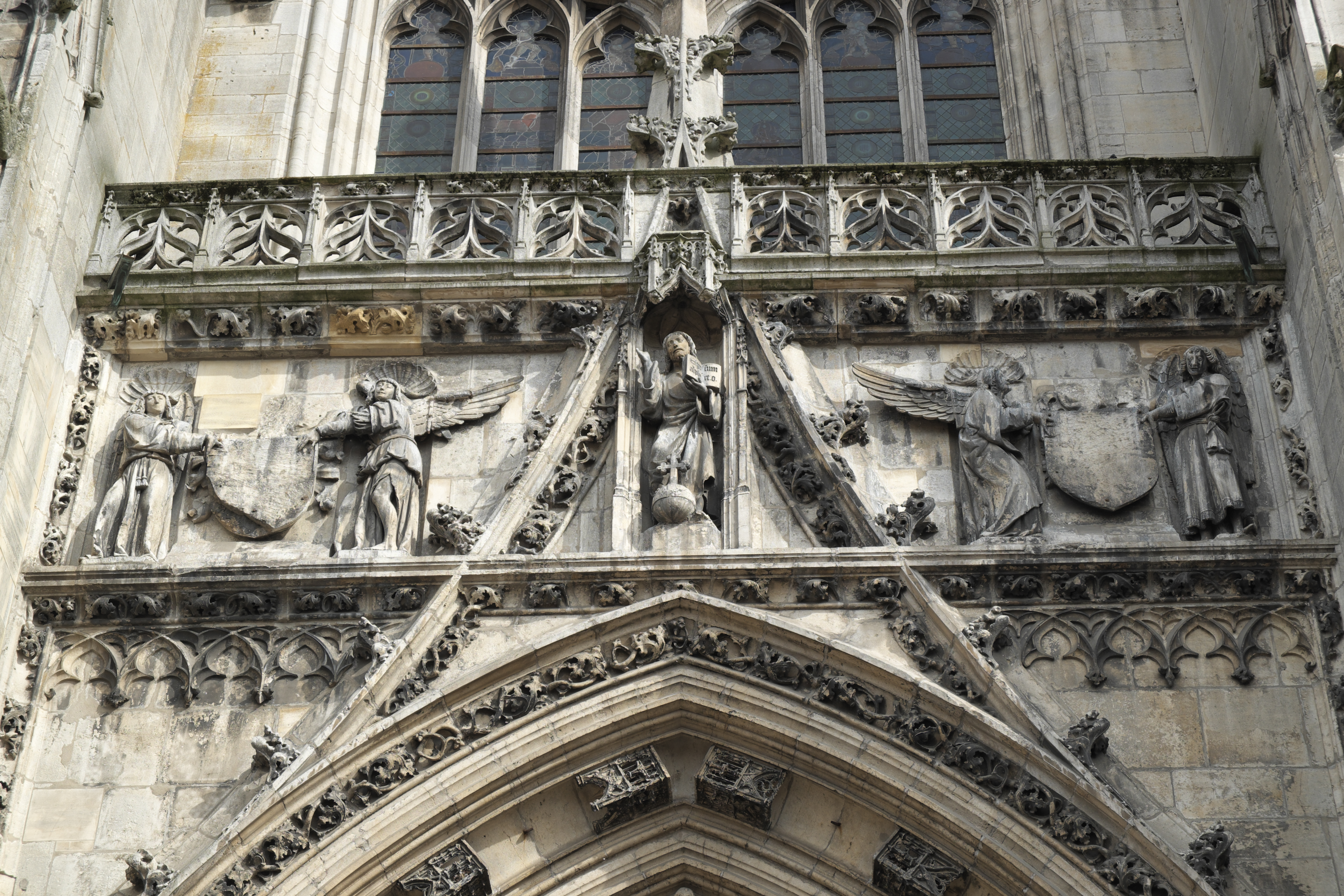 Basilika Saint-Nicolas in Saint-Nicolas-de-Port im Département Meurthe-et-Moselle (Lothringen/Frankreich), Dekor der Westfassade, Wimperg über dem Portal